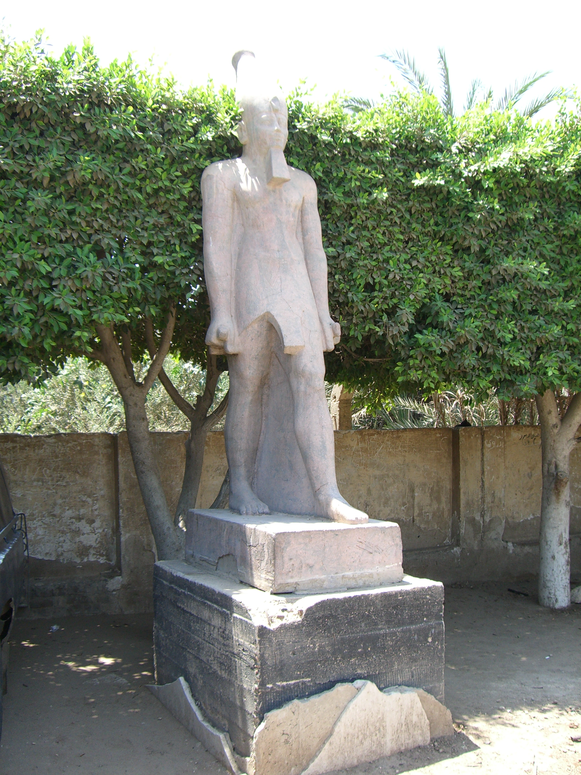 Colosse de Sésostris Ier à l'entrée du musée en plein air d'Héliopolis - XIIe dynastie Moyen Empire - Le Caire